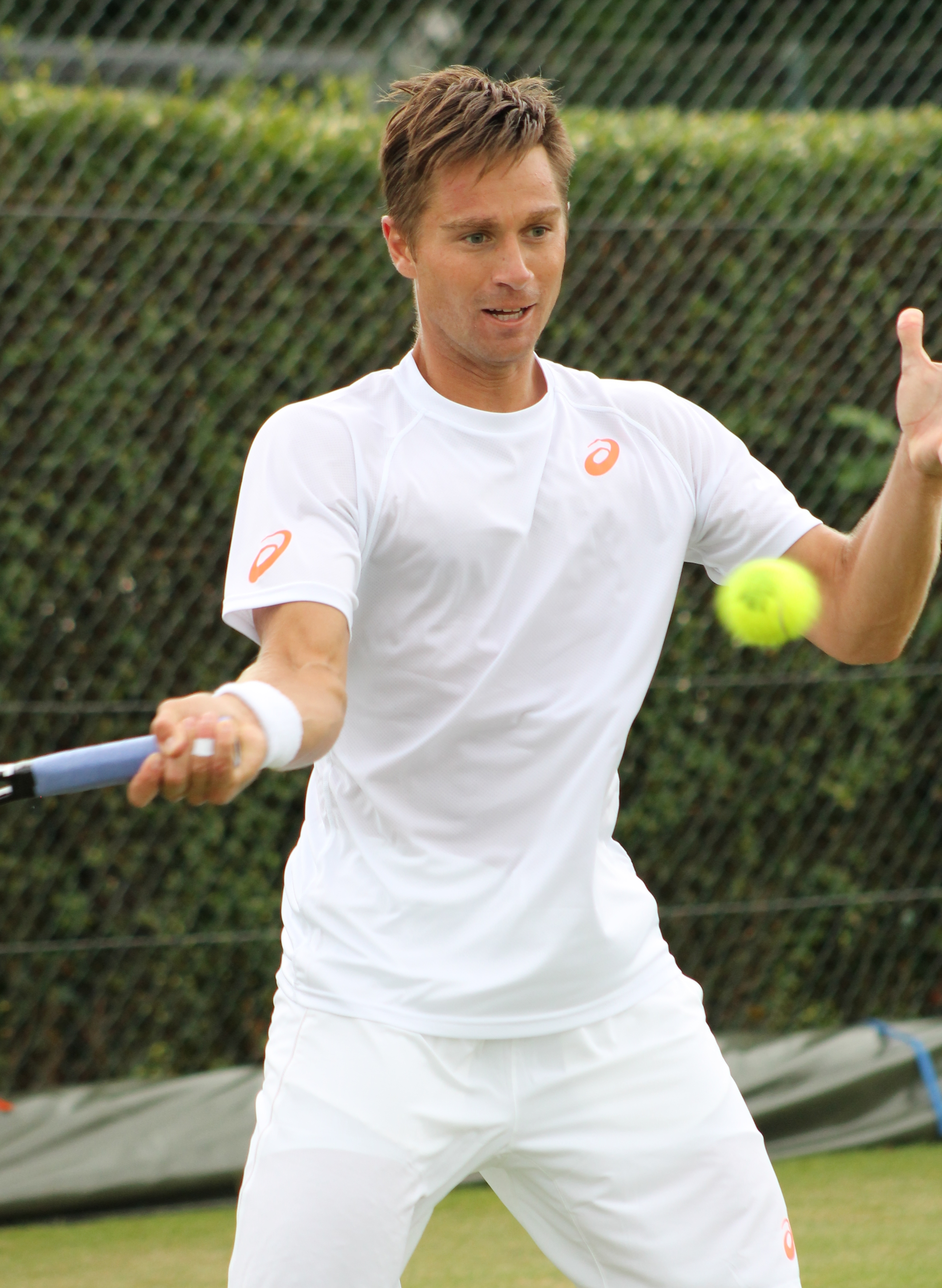 Kuznetsov Al. WMQ14 (6)